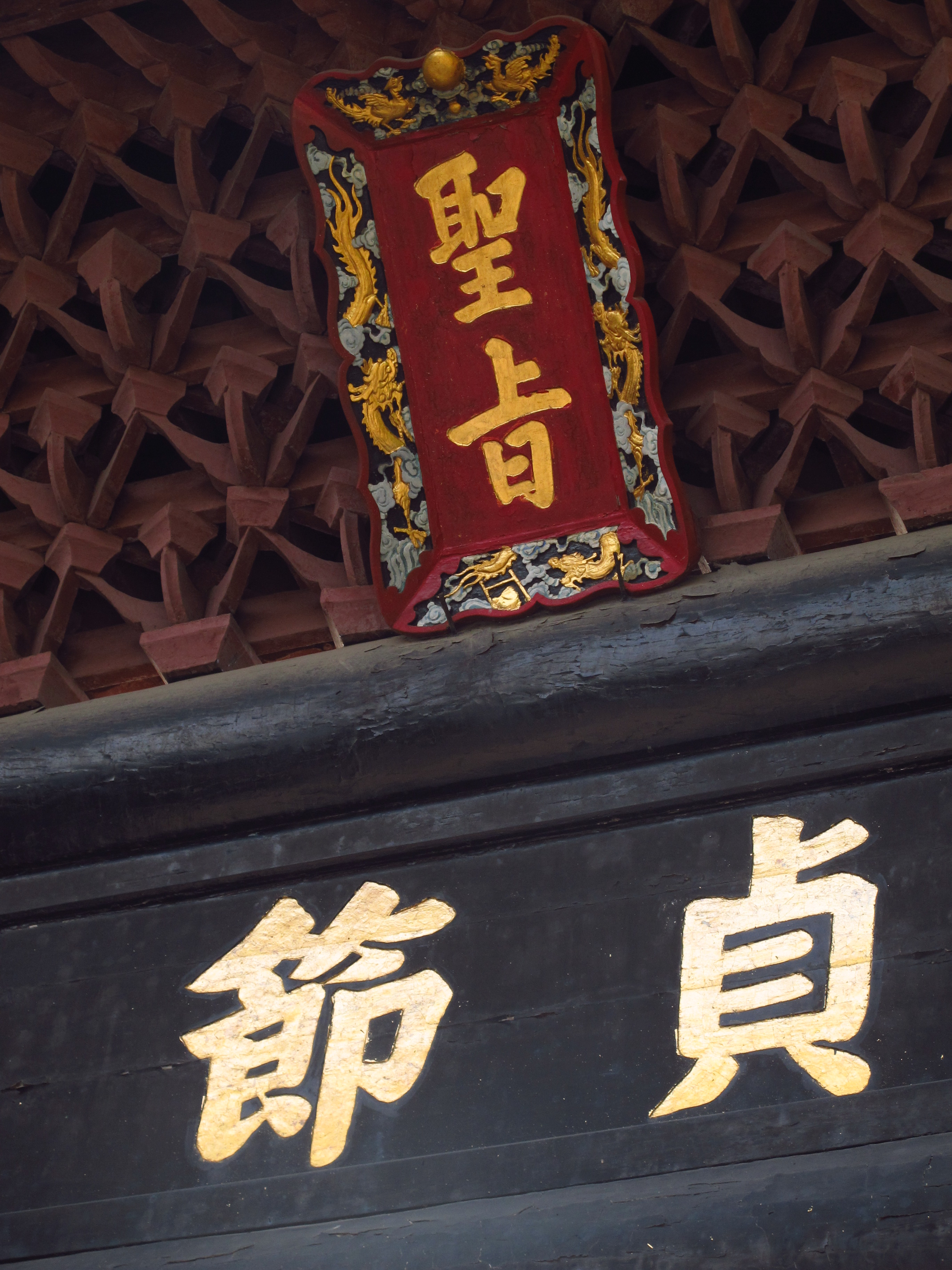 中文（中国大陆）: 该贞节牌坊就是指陈白沙的母亲为了表扬妇女的贞节(指女子不改嫁或不失身)而立的牌坊